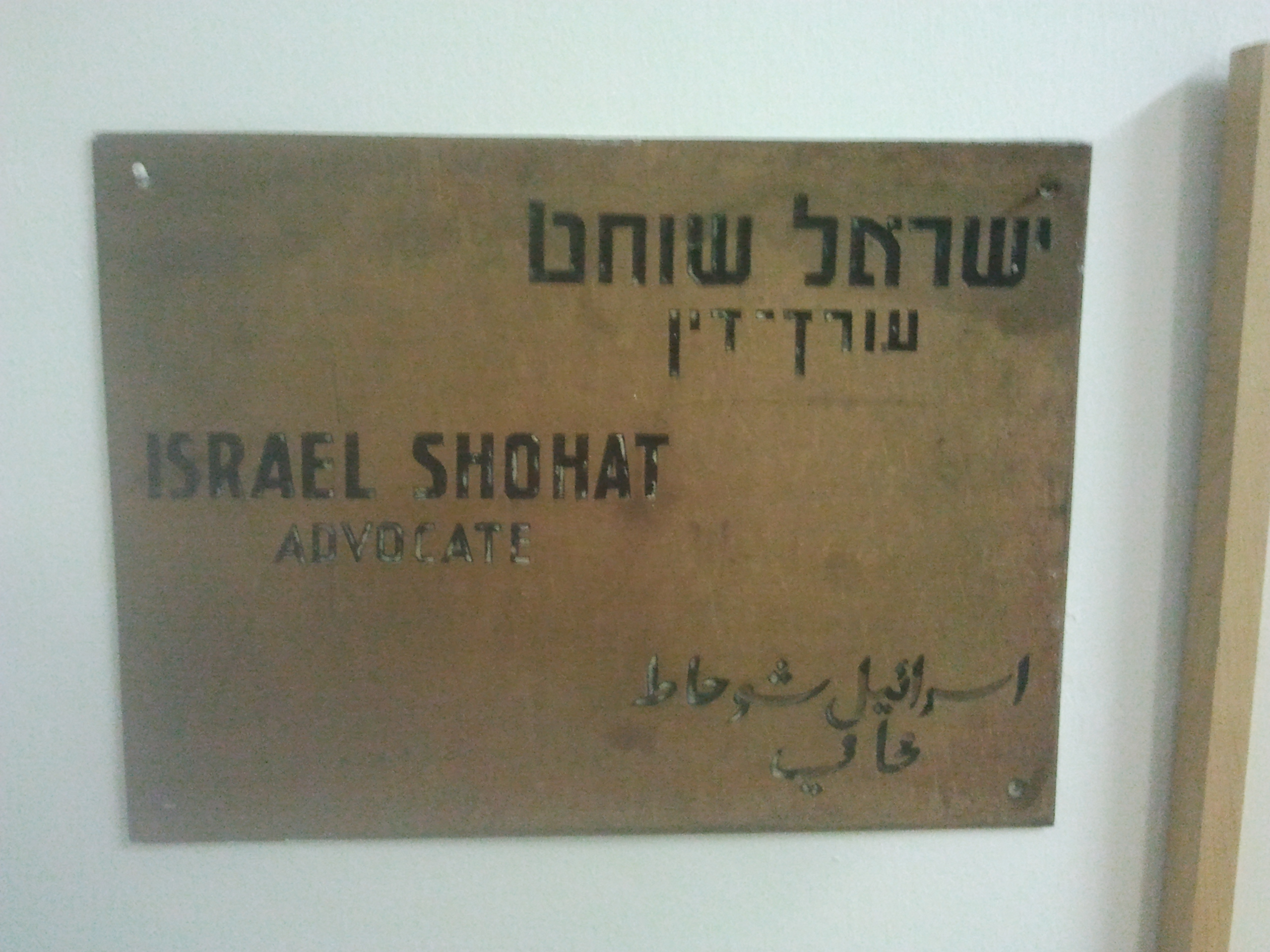 מוזיאון בית השומר שלט של ישראל שוחט עורך דין